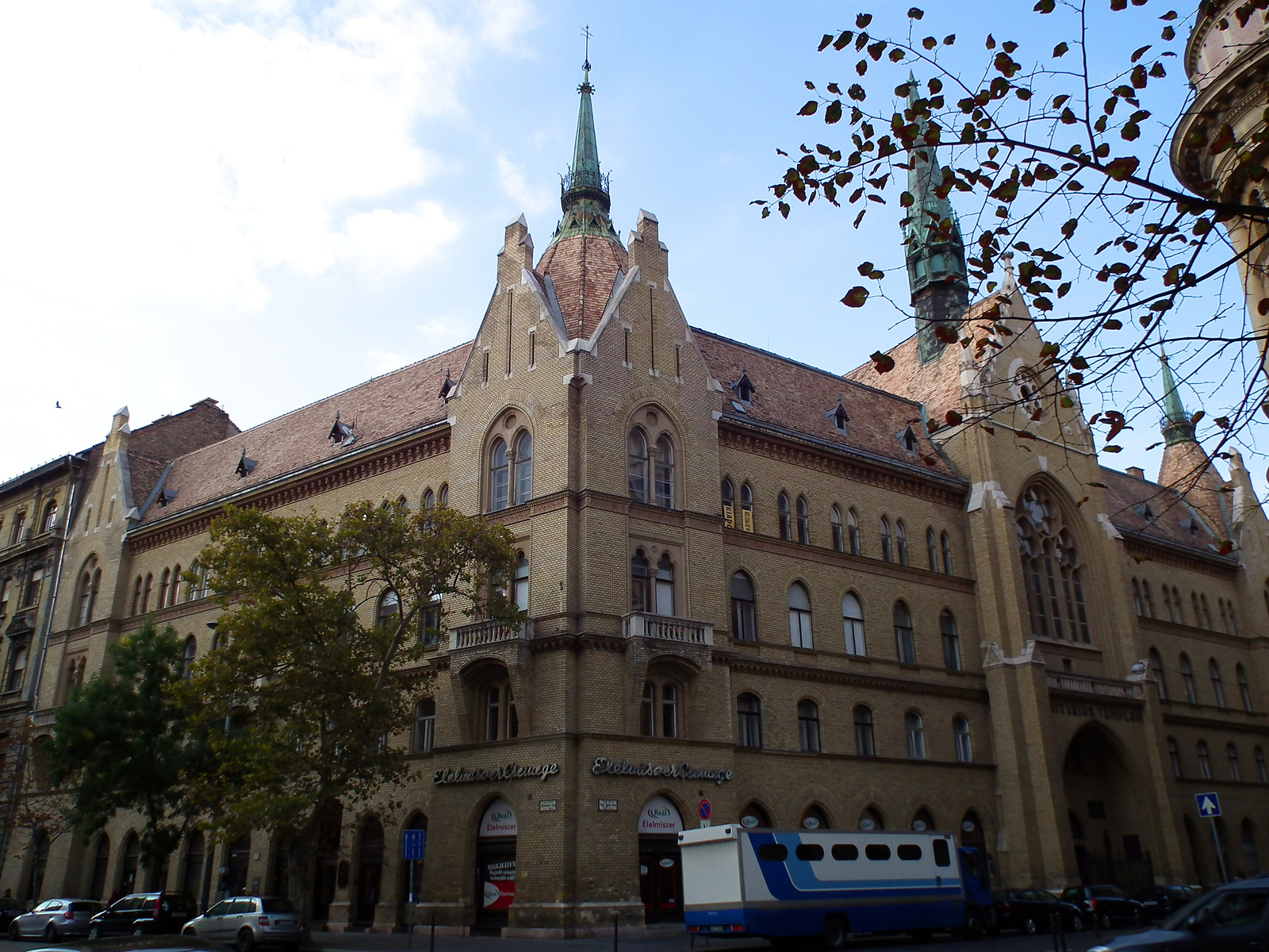 lakóház (Budapest 5, Nagy Ignác utca 2., Alkotmány utca 12.) This is a photo of a monument in Hungary, Identifier: 15842